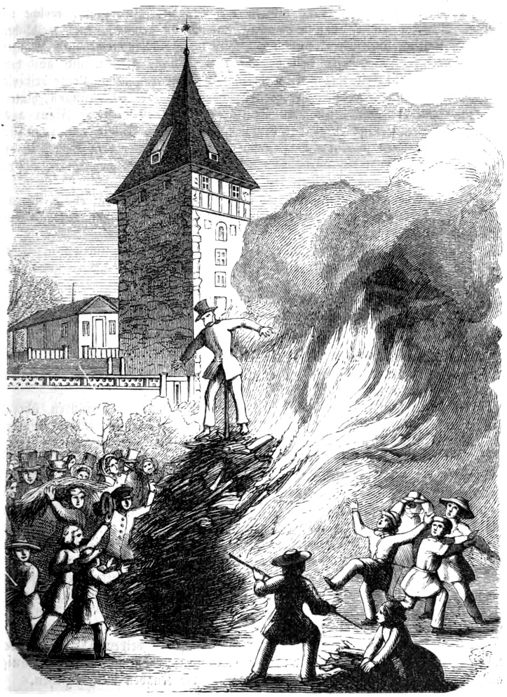 Das Winterverbrennen